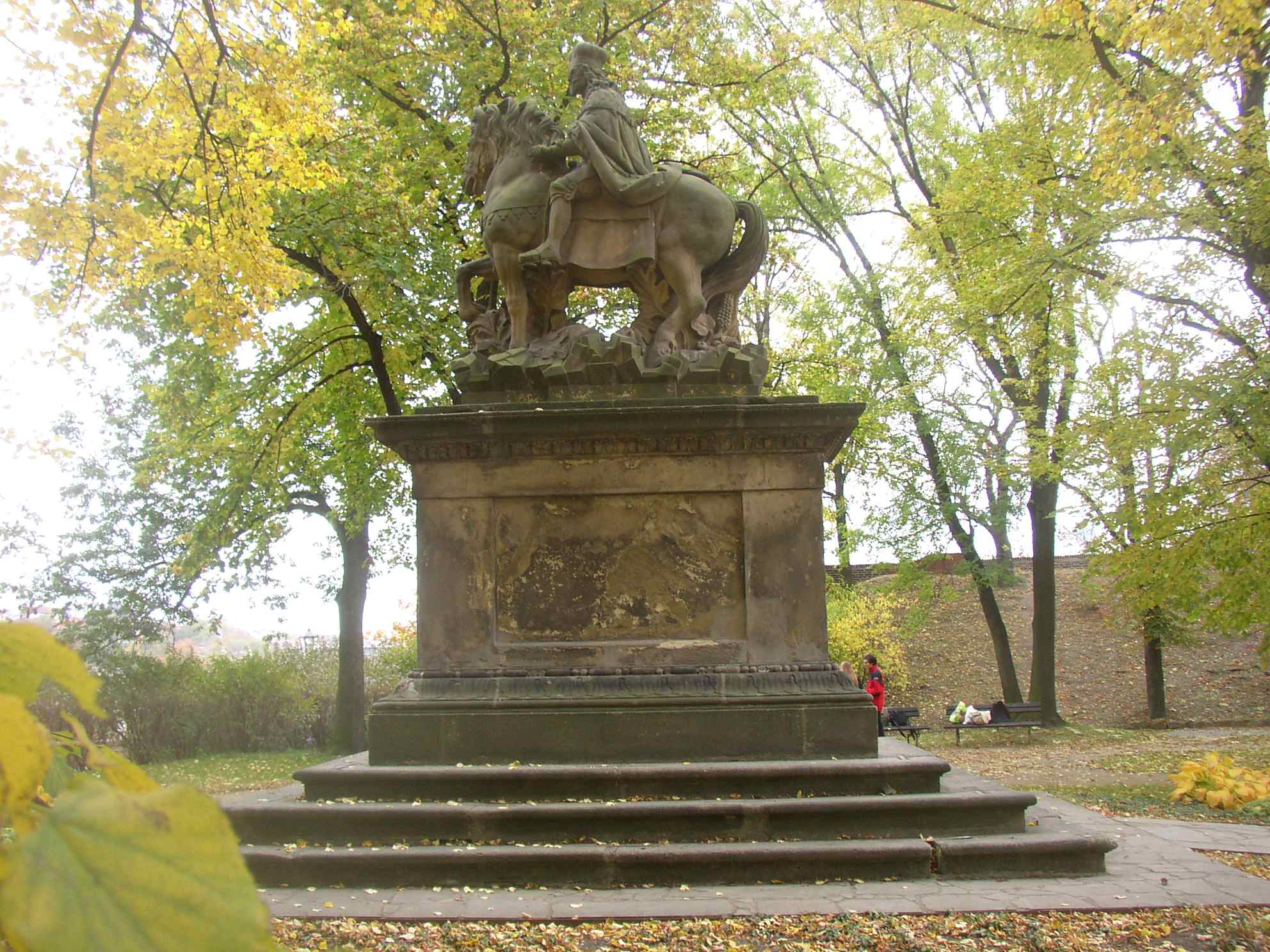 Equestrian statue of St. Wenceslas, Vyšehrad, Prague, Czech Republic. The statue was sculpted in 1678-1680 by Jan Jiří Bendl (for 200 guldens and 936 l of rye flour). It was originally placed as part of a fountain in the middle of Horse Market in the New Town of Prague (today's name of the square - Wenceslas Square - derives from this statue). It was transferred to Vyšehrad in 1879 and a new monument of St. Wenceslas by Josef Václav Myslbek (today in the front of National Museum) was made later for the square. Jezdecká socha sv. Václava je dílem Jana Jiřího Bendla z let 1678-1680. Autor za její vytesání tehdy obdržel od novoměstské radnice 200 zlatých a 10 korců (936 litrů) žitné mouky. Původně tvořila součást kašny, stojící uprostřed Koňského trhu na úrovni Jindřišské a Vodičkovy ulice. V roce 1827 byla přemístěna o několik desítek kroků výše a opatřena novým podstavcem od Josefa Krannera. Od této sochy pochází nynější název Václavské náměstí, jak ho poprvé navrhl 16. března 1848 Karel Havlíček Borovský, u ní se ve dnech 4. a 11. června téhož roku konaly mše pod širým nebem, z nichž ta druhá, svatodušní, sloužená Janem Arnoldem, skončila památnými nepokoji. Roku 1879 došlo k přenesení Bendlovy sochy do dnešních Štulcových sadů na Vyšehrad a Václavské náměstí později doplnil nový pomník od Josefa Václava Myslbeka. Photo taken by Miaow Miaow in October 2005, PD-self Other_versions